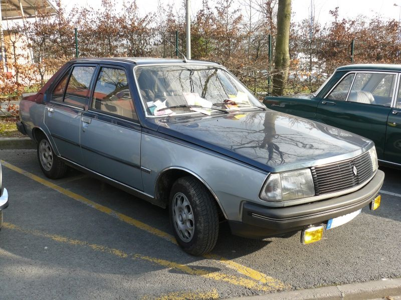 Reims 2012